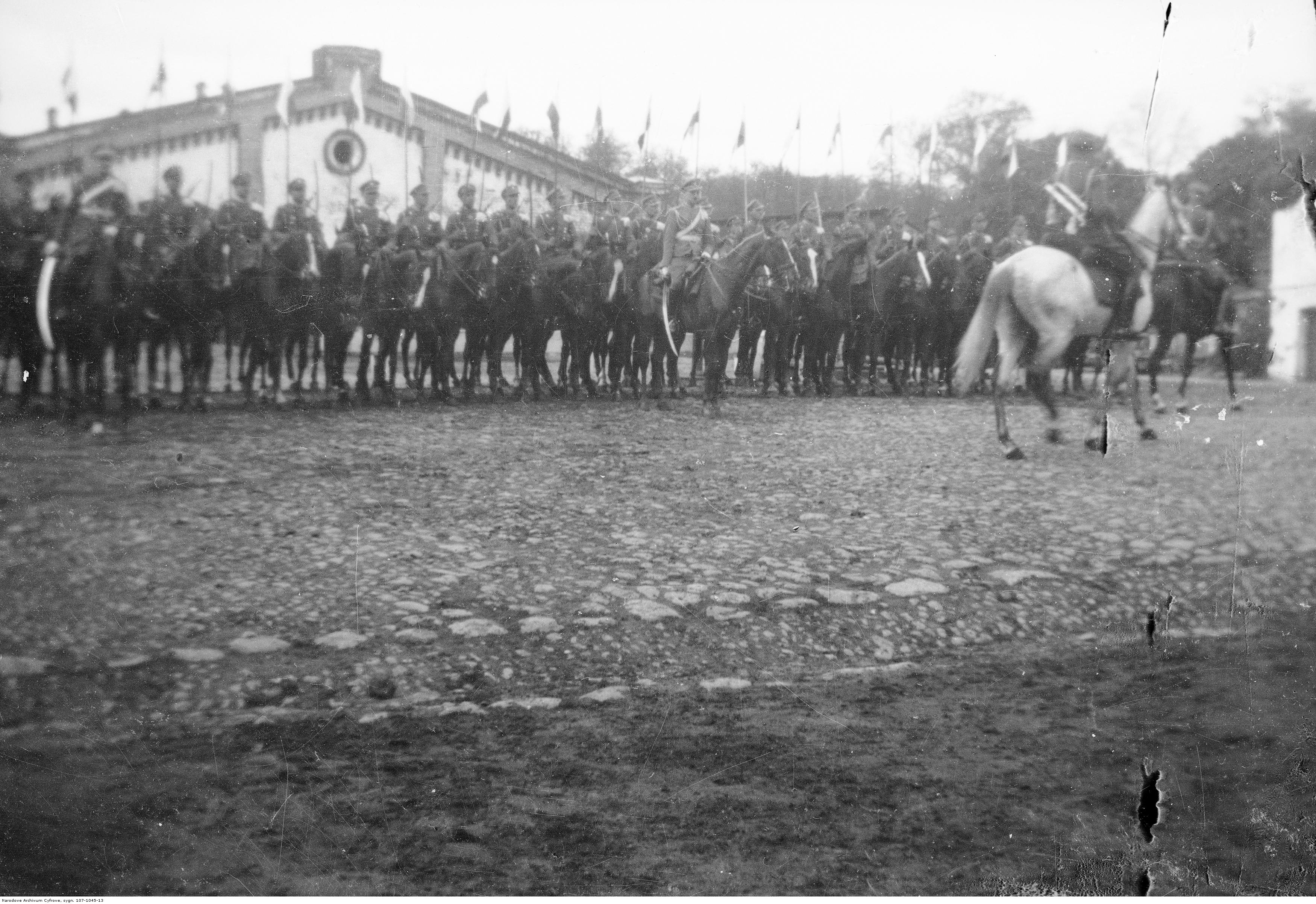 Szwadron konno z lancami na terenie koszar.